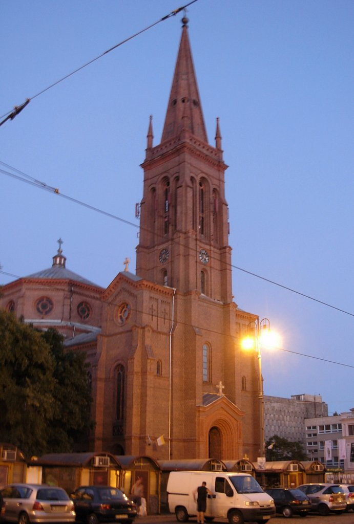 Kościół św. Piotra i Pawła w Bydgoszczy